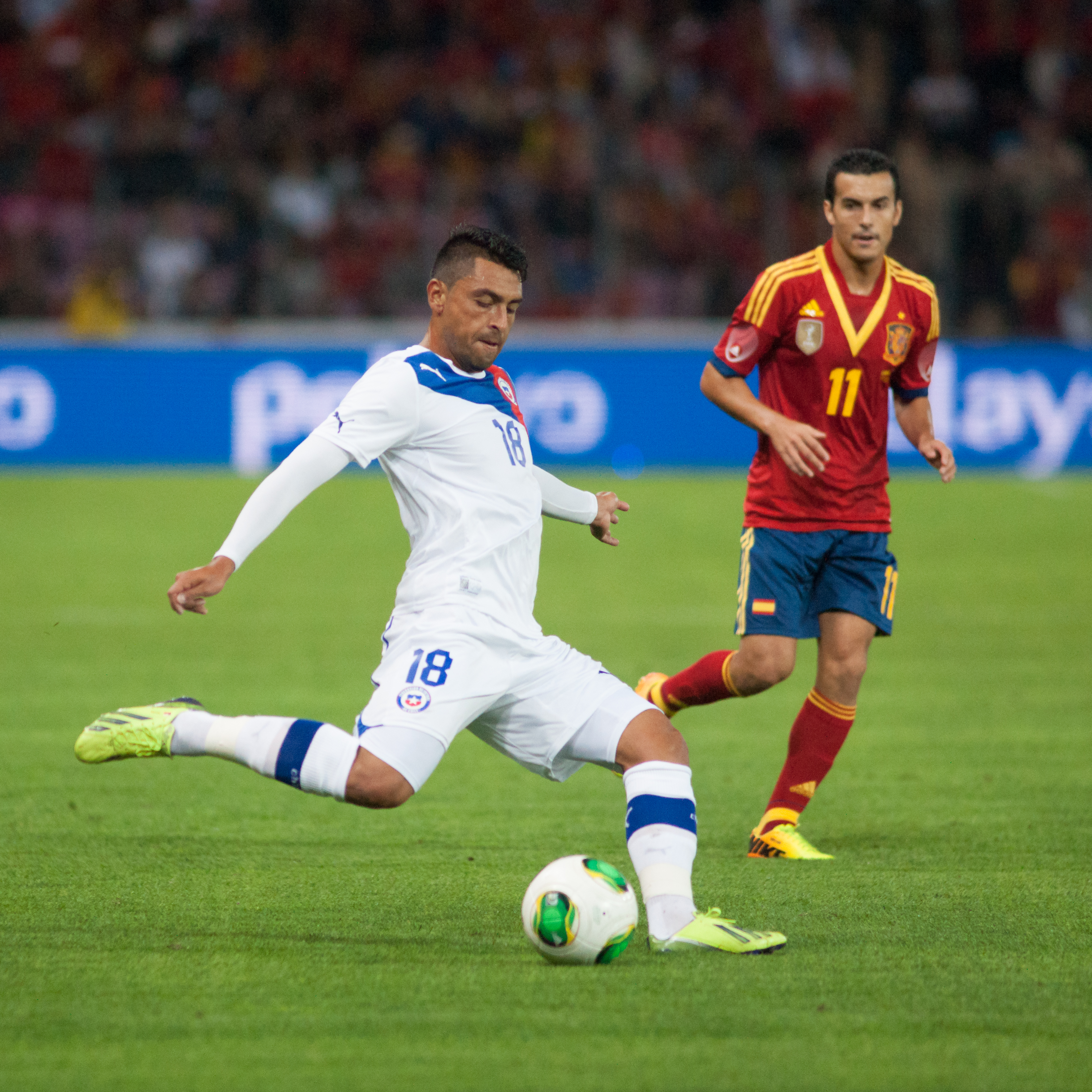 Espagne - Chili, 10 septembre 2013.